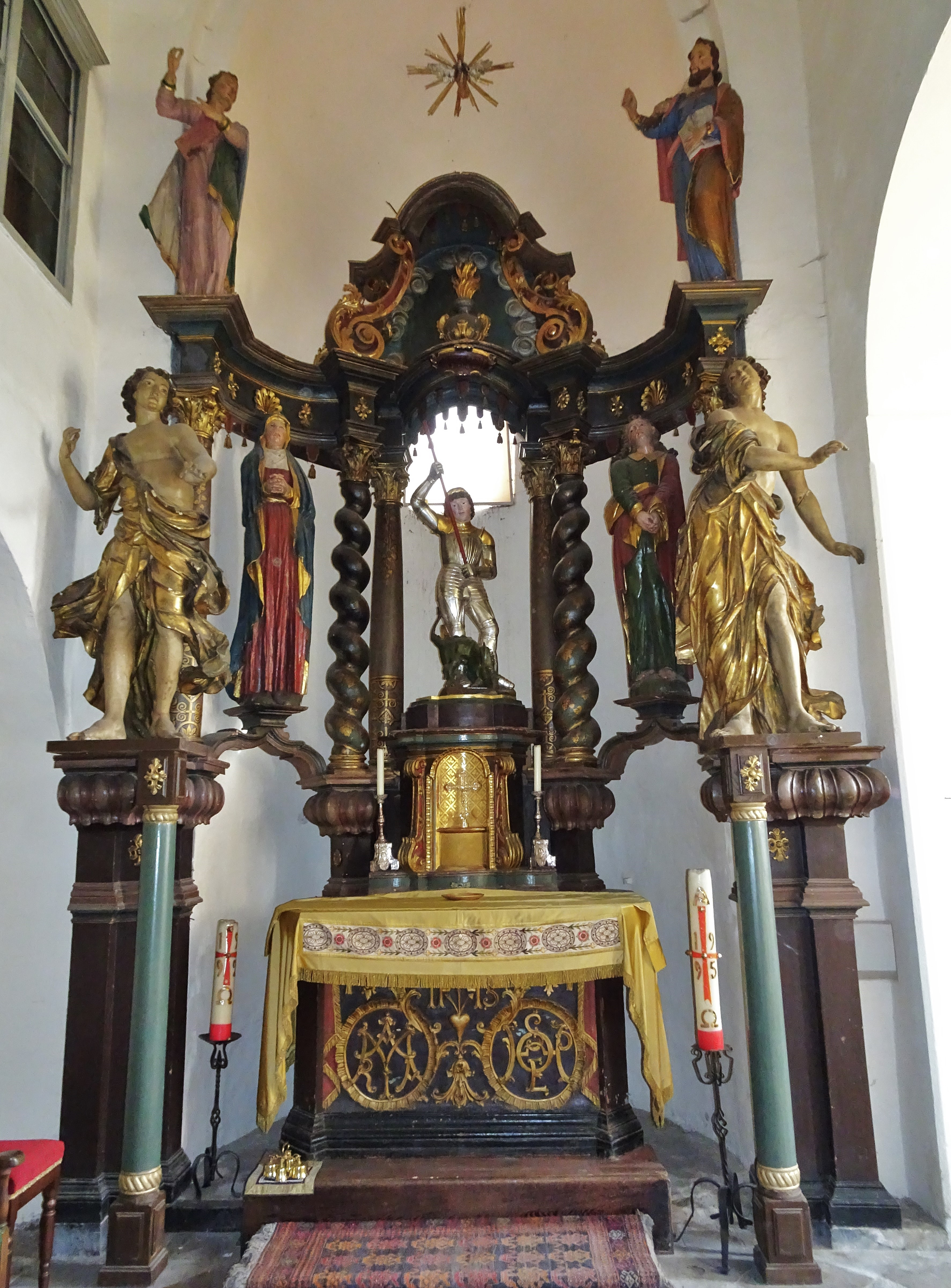 Schloss Eberstein (Kärnten) der Hochaltar der Schlosskapelle